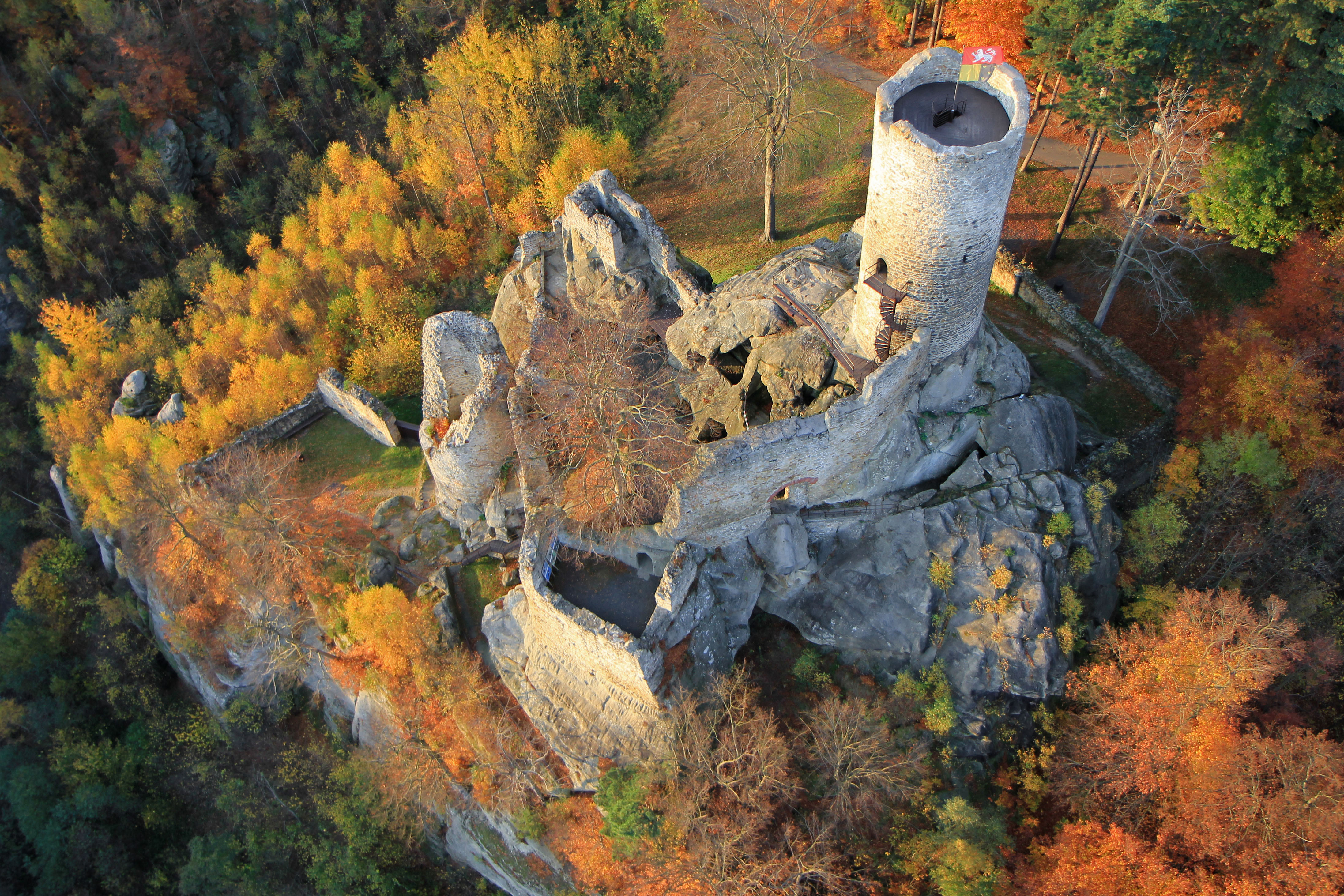 Hrad Frýdštejn, Frýdštejn.